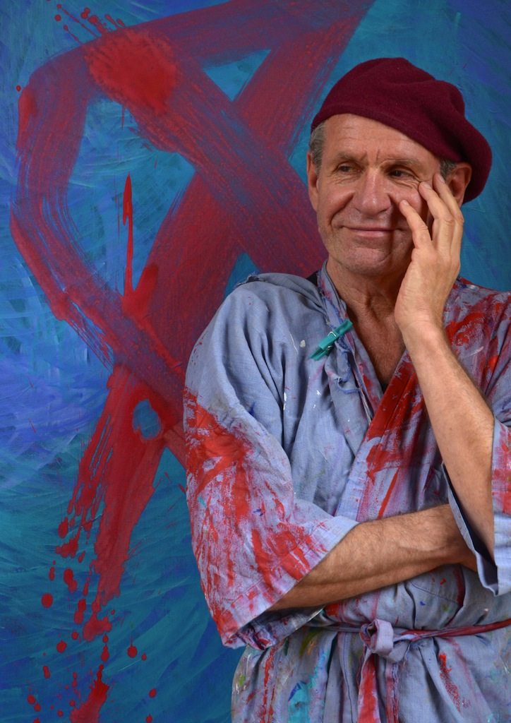 Dominic Ortelt fotografiert am 04. September 2013 den Künstler Jürgen Draeger in seinem Atelier im Ratenau-Saal in Berlin Oberschöneweide nach der Fertigstellung eines Gemäldes mit Lehmfarben (Draegerismus).